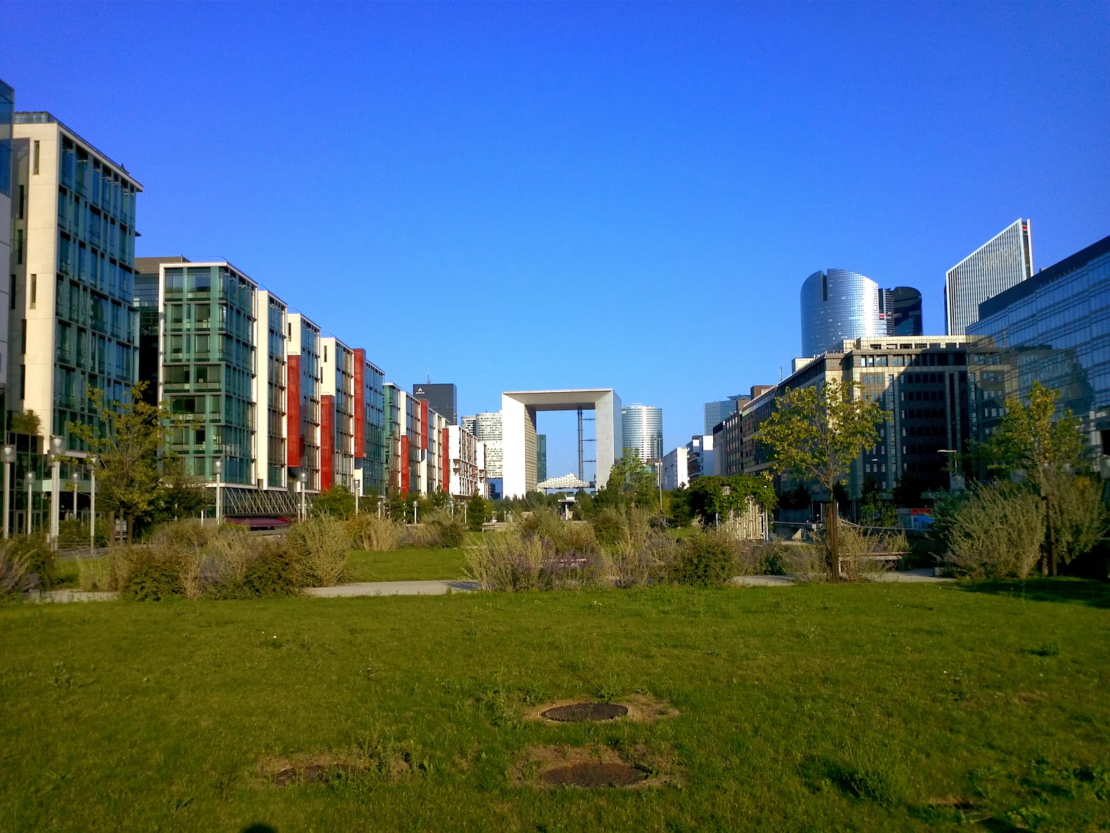 Les Terrasses de Nanterre avec vue sur la Grande Arche